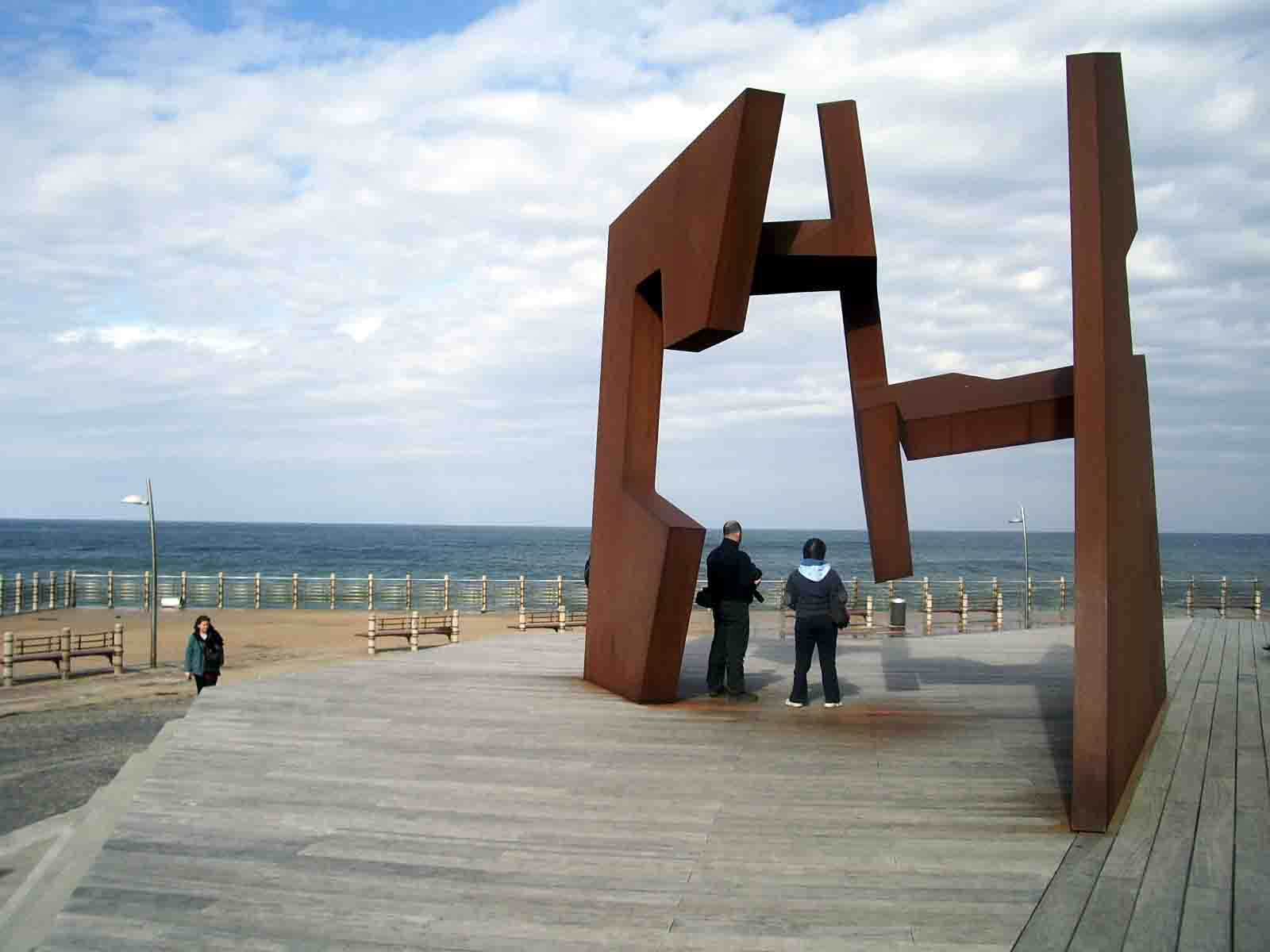 Donostiako Pasealeku Berrian kokatzen den "Eraikuntza hutsa" Jorge Oteitza eskultorearena.